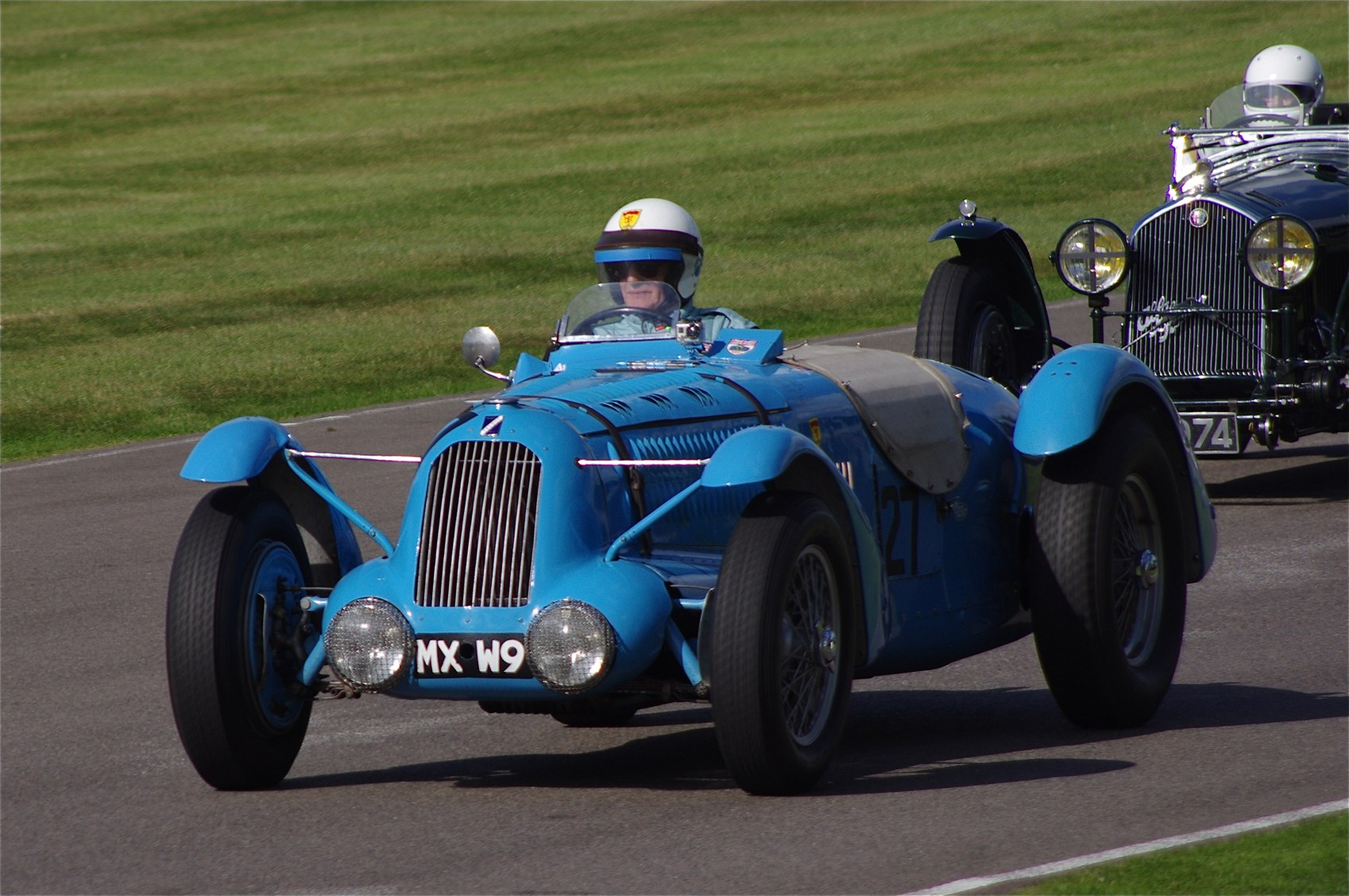 Goodwood Revival 2012